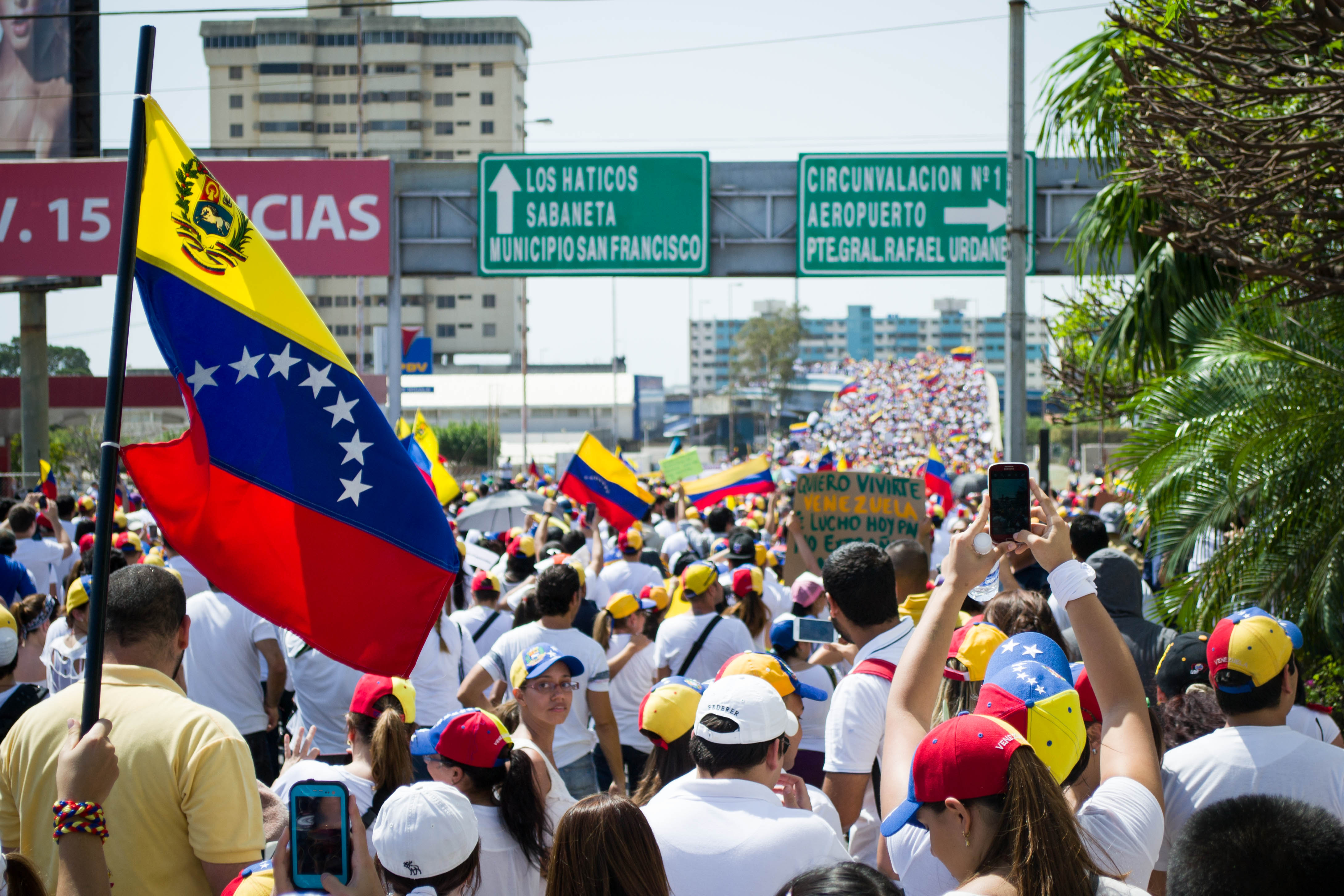 La gente de la oposición marchó pacíficamente hasta las inmediaciones del Palacio de Justicia de la ciudad de Maracaibo.